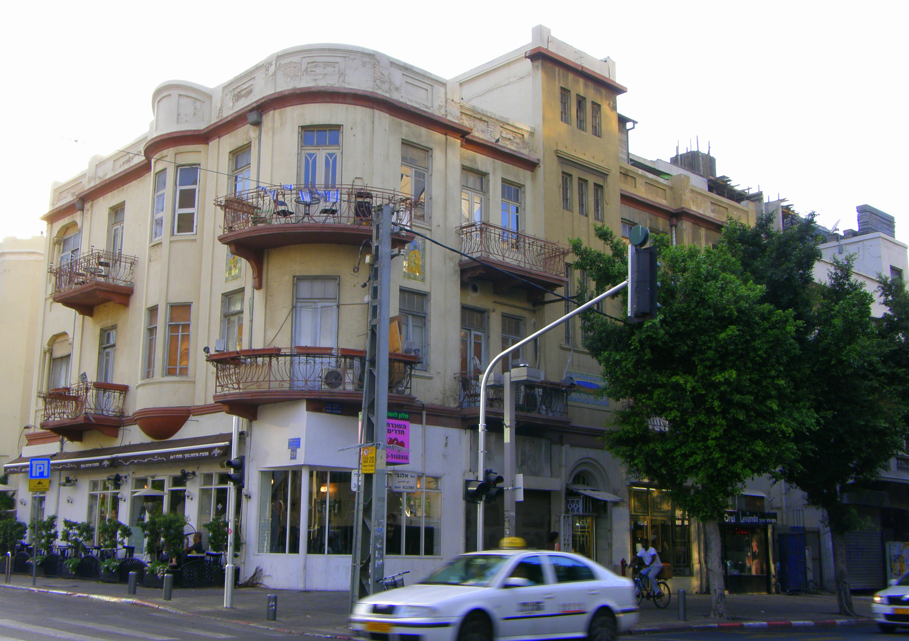 בית בשדרות רוטשילד פינת אלנבי בתל אביב. תוכנן על ידי האדריכל יוסף ברלין בשנת 1922. הסגנון העיצובי אקלקטי. המעקות מעוצבים כחנוכייה, ואת החלונות מעטרים עמודים קורינתיים. על החזיתות משובצים אריחי קרמיקה צבעוניים האריחים מציגים נופים מארץ ישראל וסיפורים מן התנ"ך. בחזית הפונה לאלנבי – ציור העיר ירושלים, וכן ציון שם בעלי הבית.